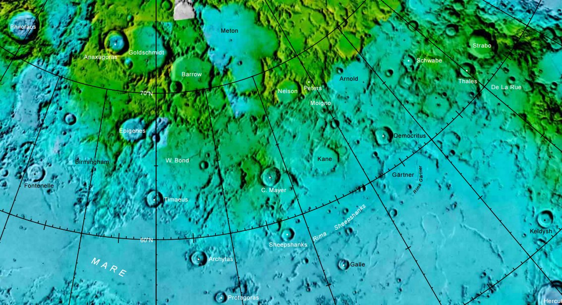 Cráter lunar Gärtner. Localización. (Imagen LRO)